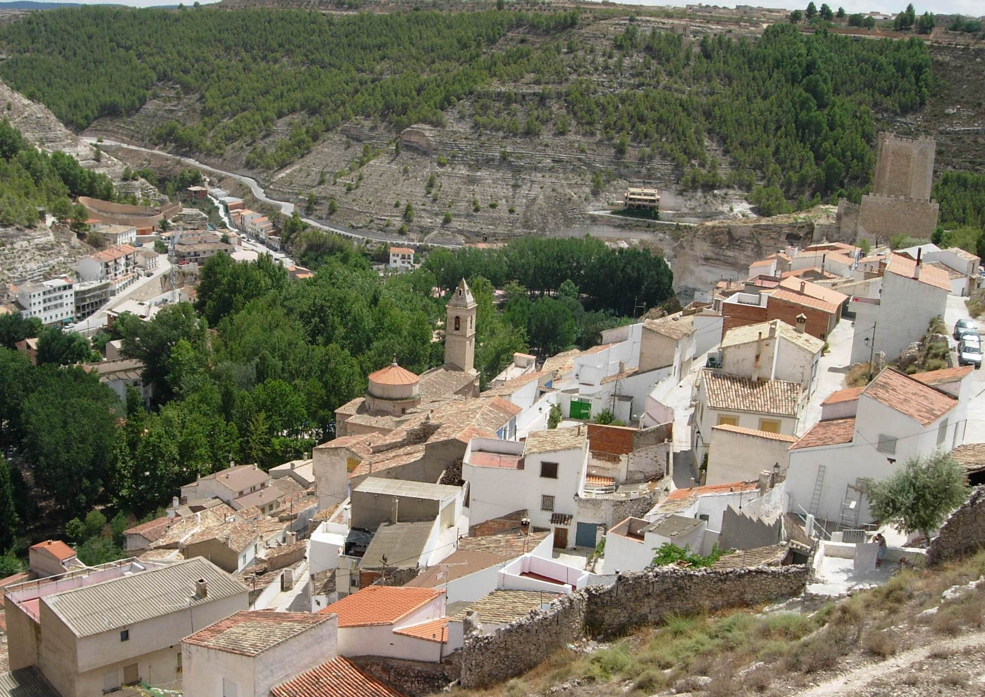 Vista panorámica de Alcalá del Júcar (Albacete, España)